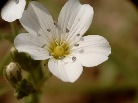 Arenaria hispanica, photo P40p sur enceclopedia lbre